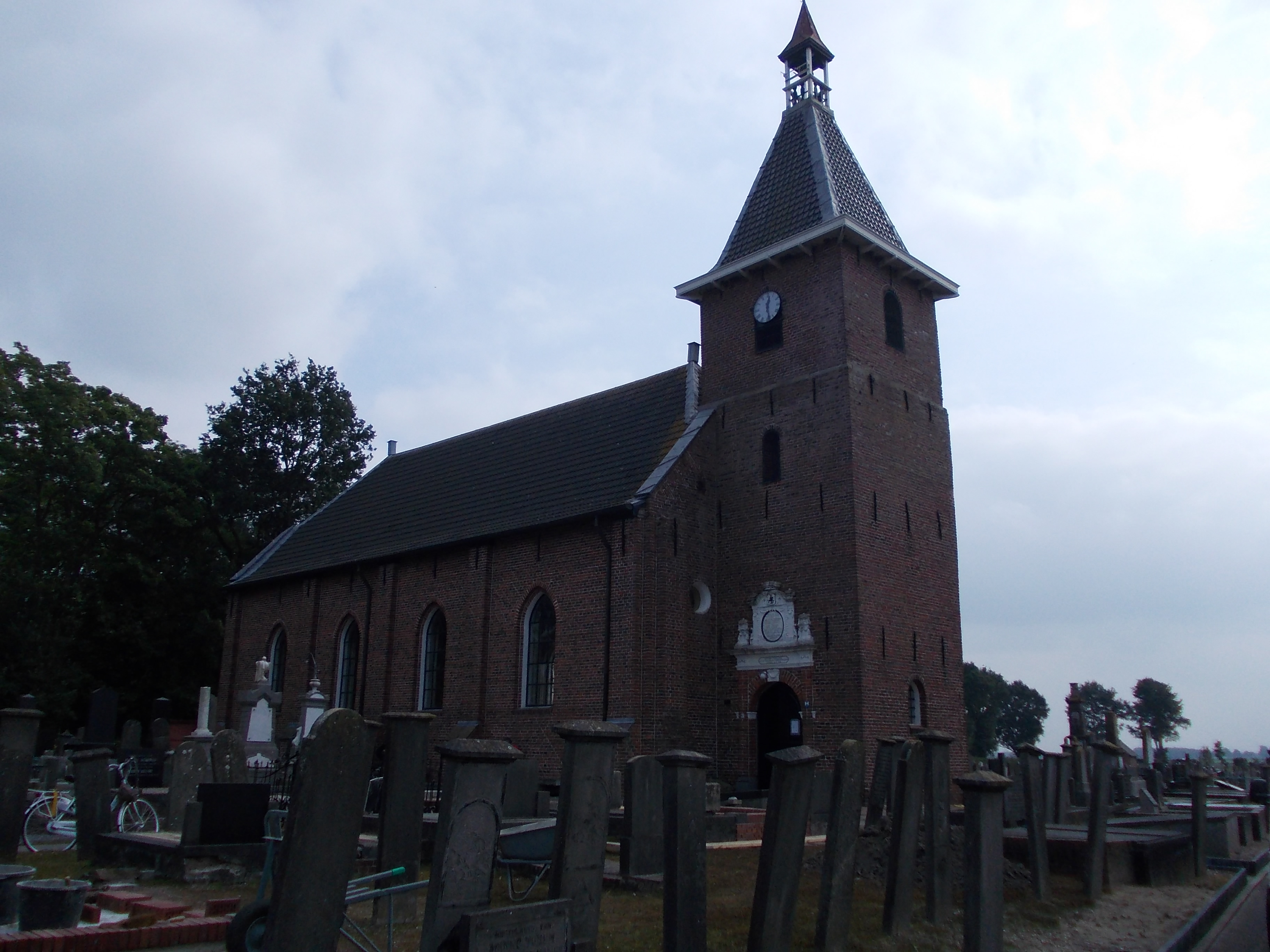 Hervormde kerk en toren